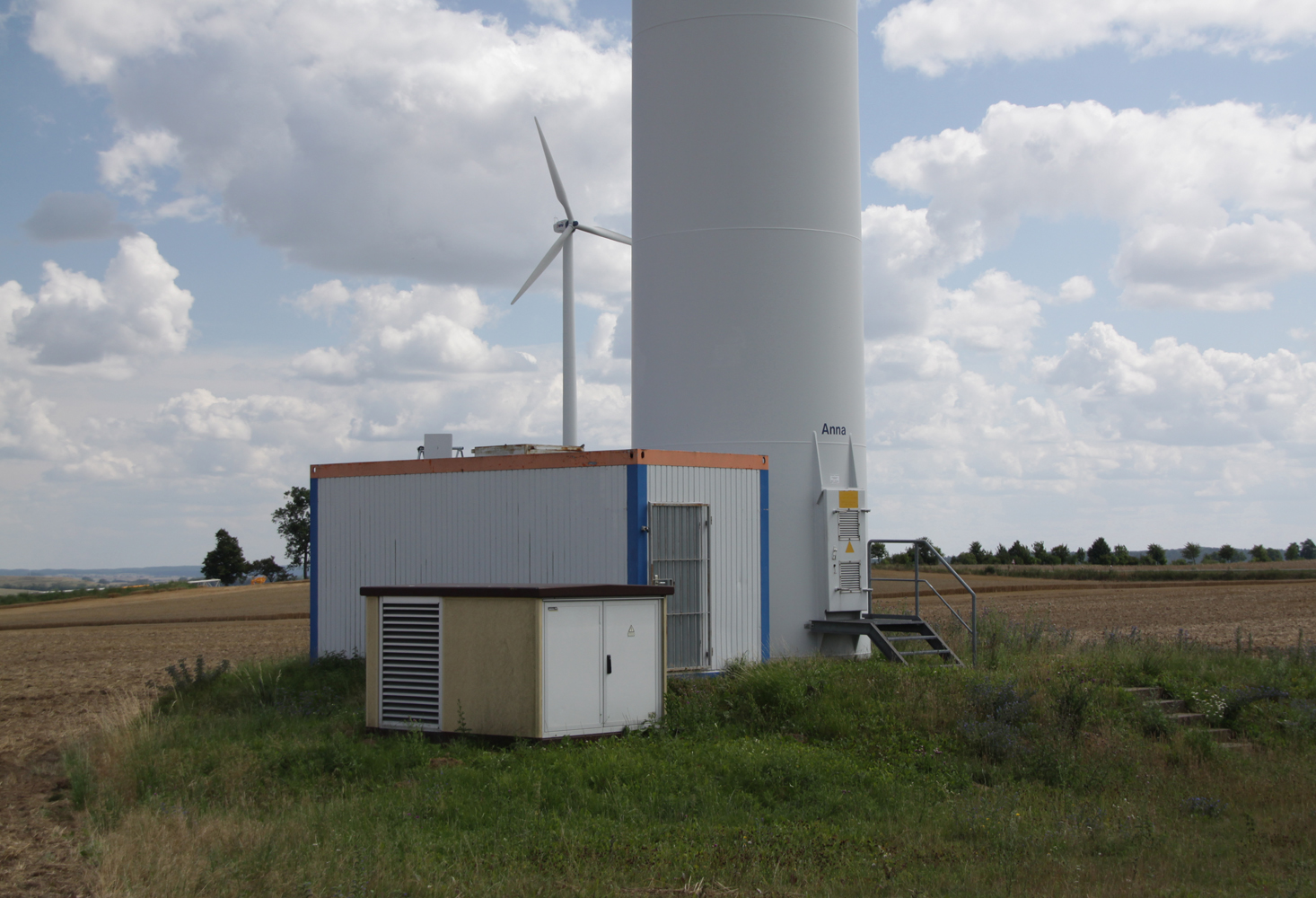 Transformatorenhäuschen (Vordergrund) und Gerätecontainer (dahinter) einer Windkraftanlage - bei Prenzlau im Juli 2014.